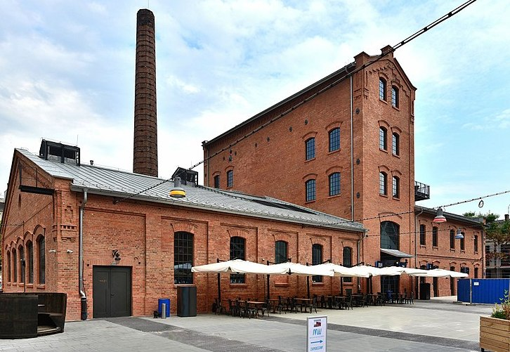 Budynek rektyfikacji na terenie kompleksu dawnej Warszawskiej Wytwórni Wódek „Koneser”